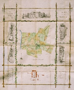 Säbyholm. Karta från 1865